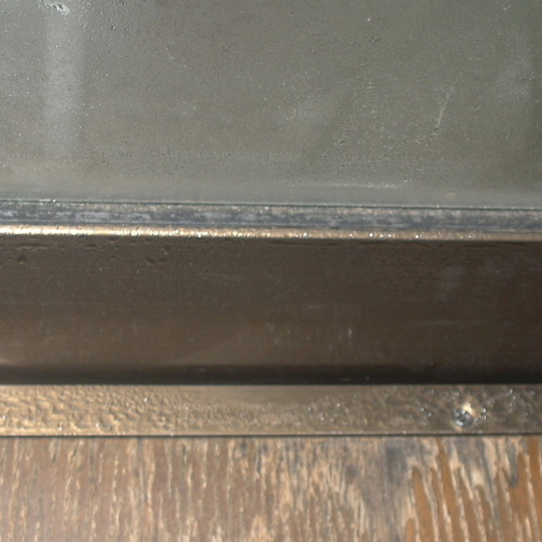 欠陥住宅_木造_断熱_01